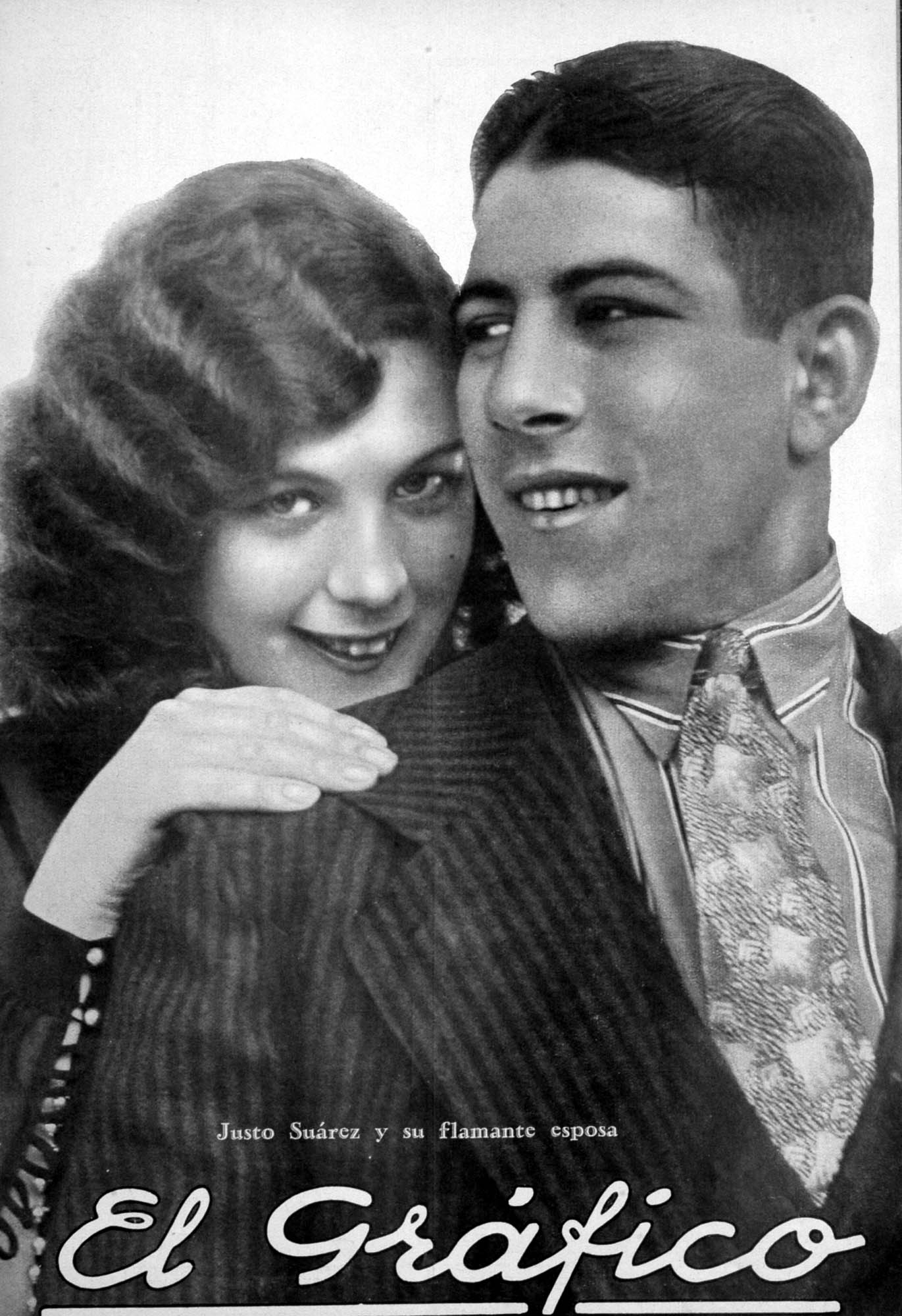 El Grafico del 31 de Mayo de 1930. Edicion 568